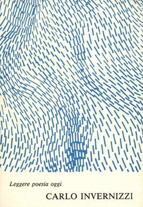 Invernizzi, Carlo, (Tamplenizza, Susanna, a cura di), Carlo Invernizzi. Leggere poesia oggi, Serie “Scandagli”, diretta da Maria Vailati, Spazio Editrice, Milano, 1988.